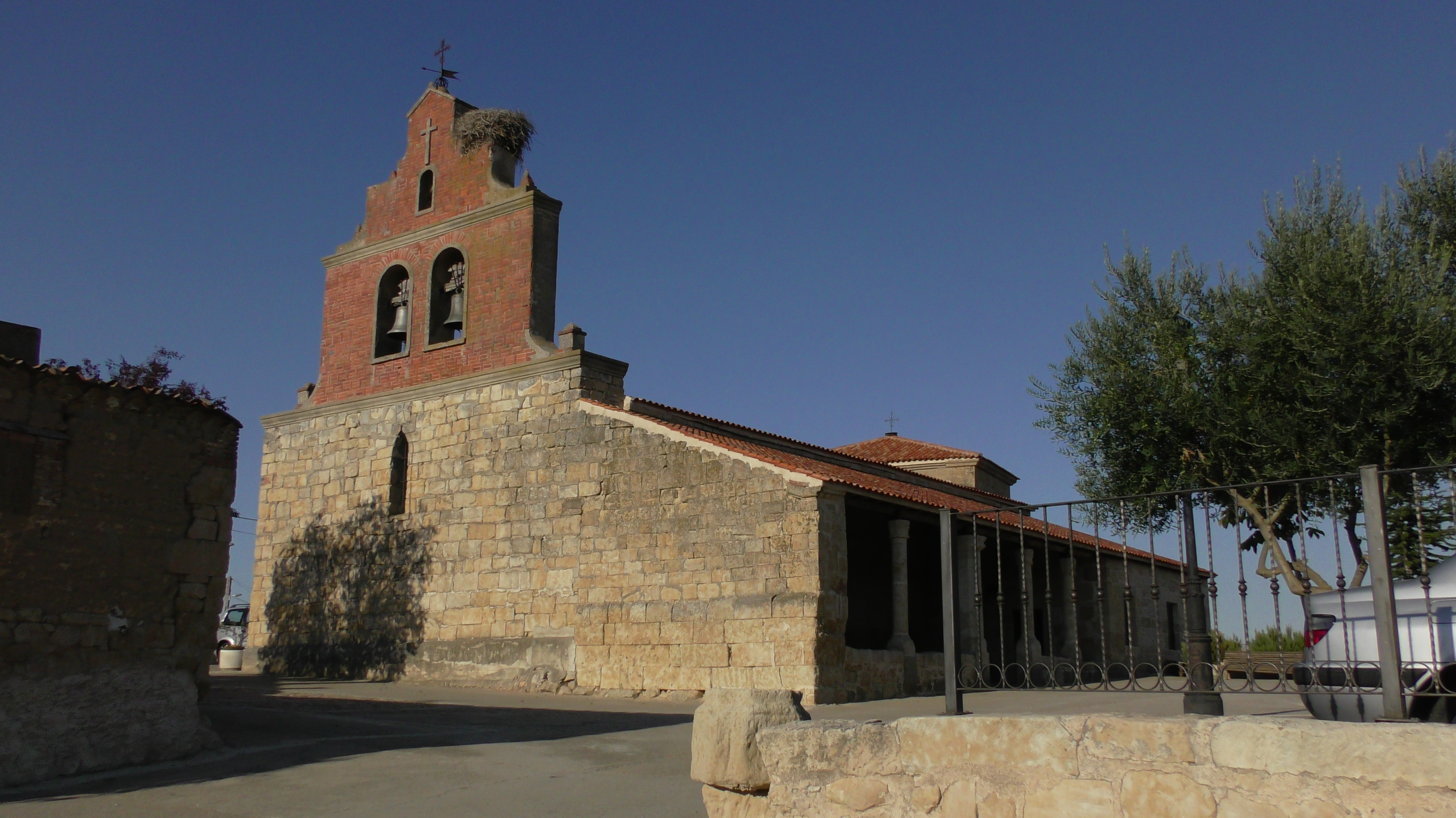 Fuentespreadas